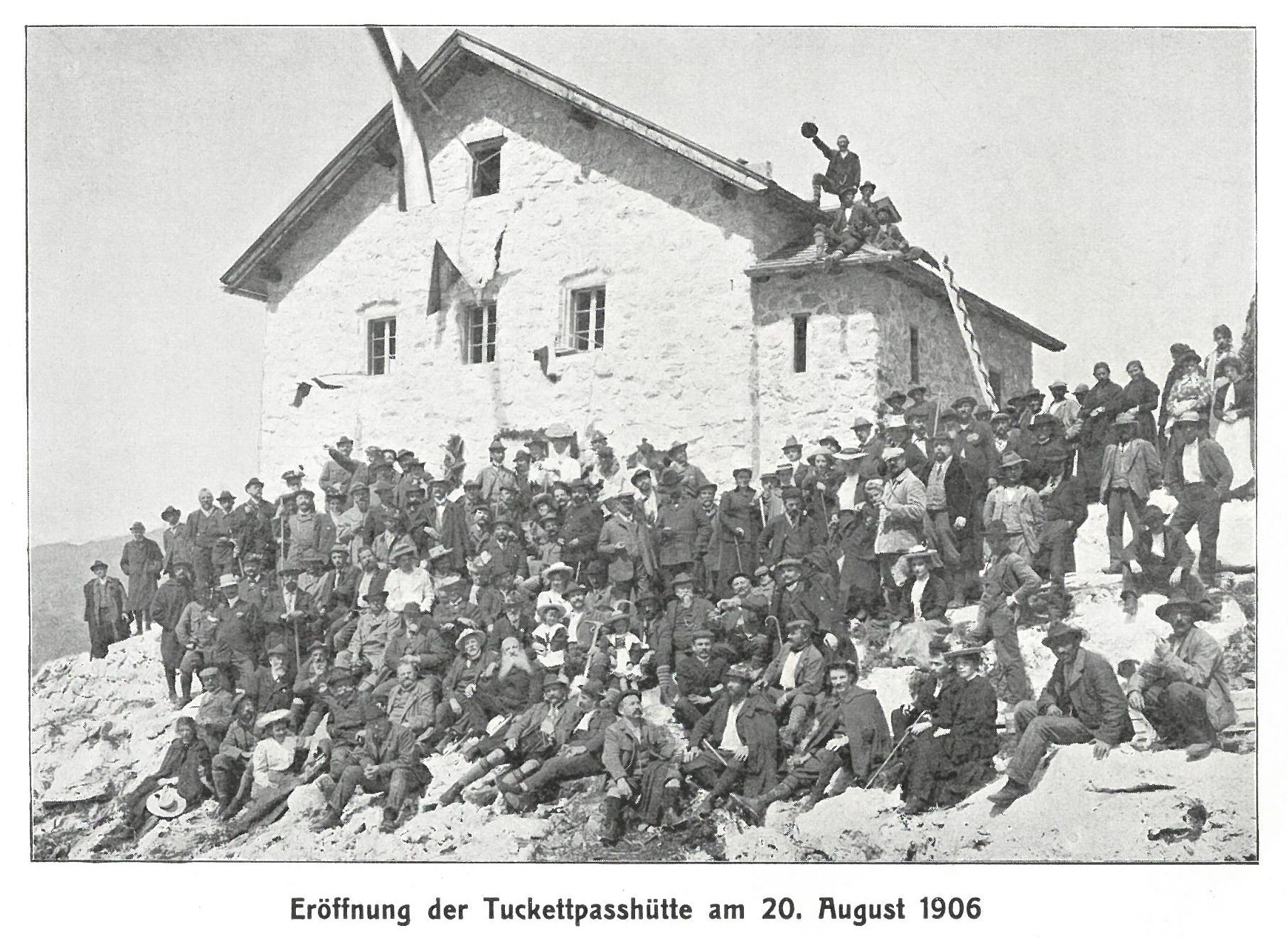 Einweihungsfeier der Tuckettpasshütte, heute Rifugio Tuckett - Quintino Sella, am 20. August 1906